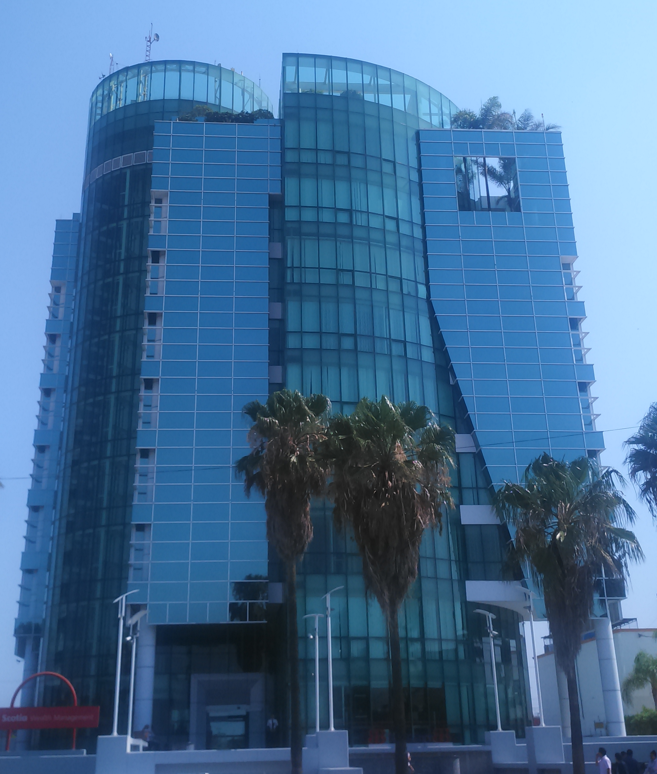 Torre Girsa, primer edificio autosustentable de Celaya